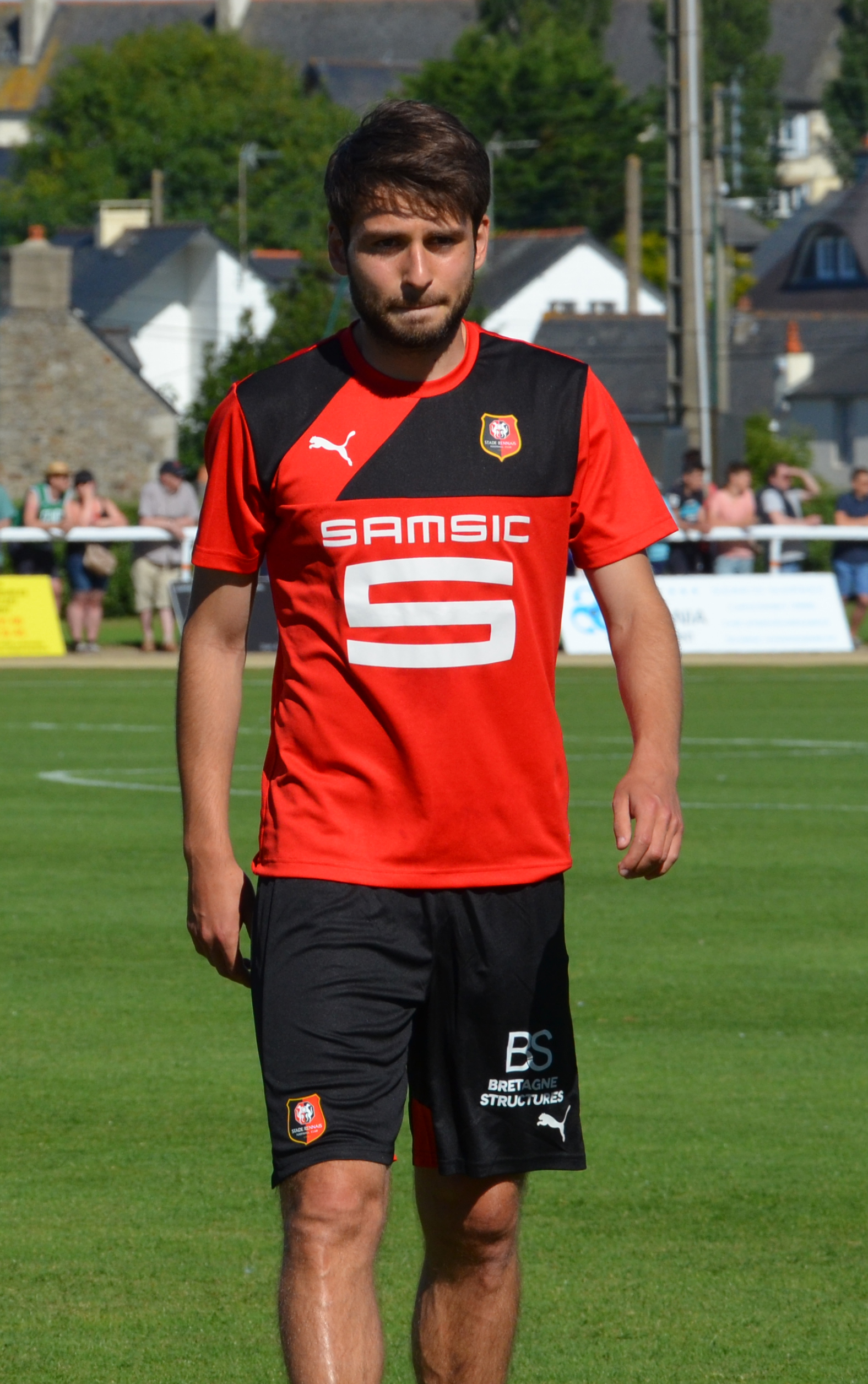 Photographie prise lors du match opposant le Stade rennais à l'USM Alger en match amical au stade Paul-Audrin de Dinard le 16 juillet 2016. Ici, Sanjin Prcic.